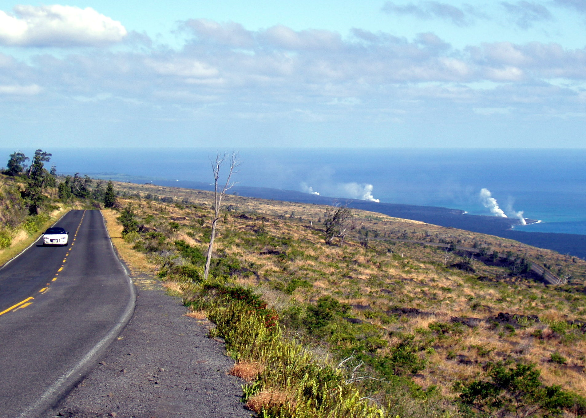 Hawaii Volcanoes National Park: Stoomwolken waar lava in de Stille Oceaan stroomt Zelfgemaakte foto Jos-uit-boston, 27 januari 2007